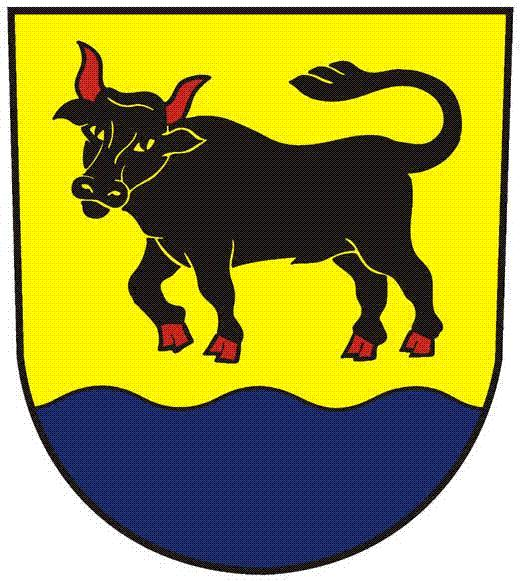 Znak obce Tuřice